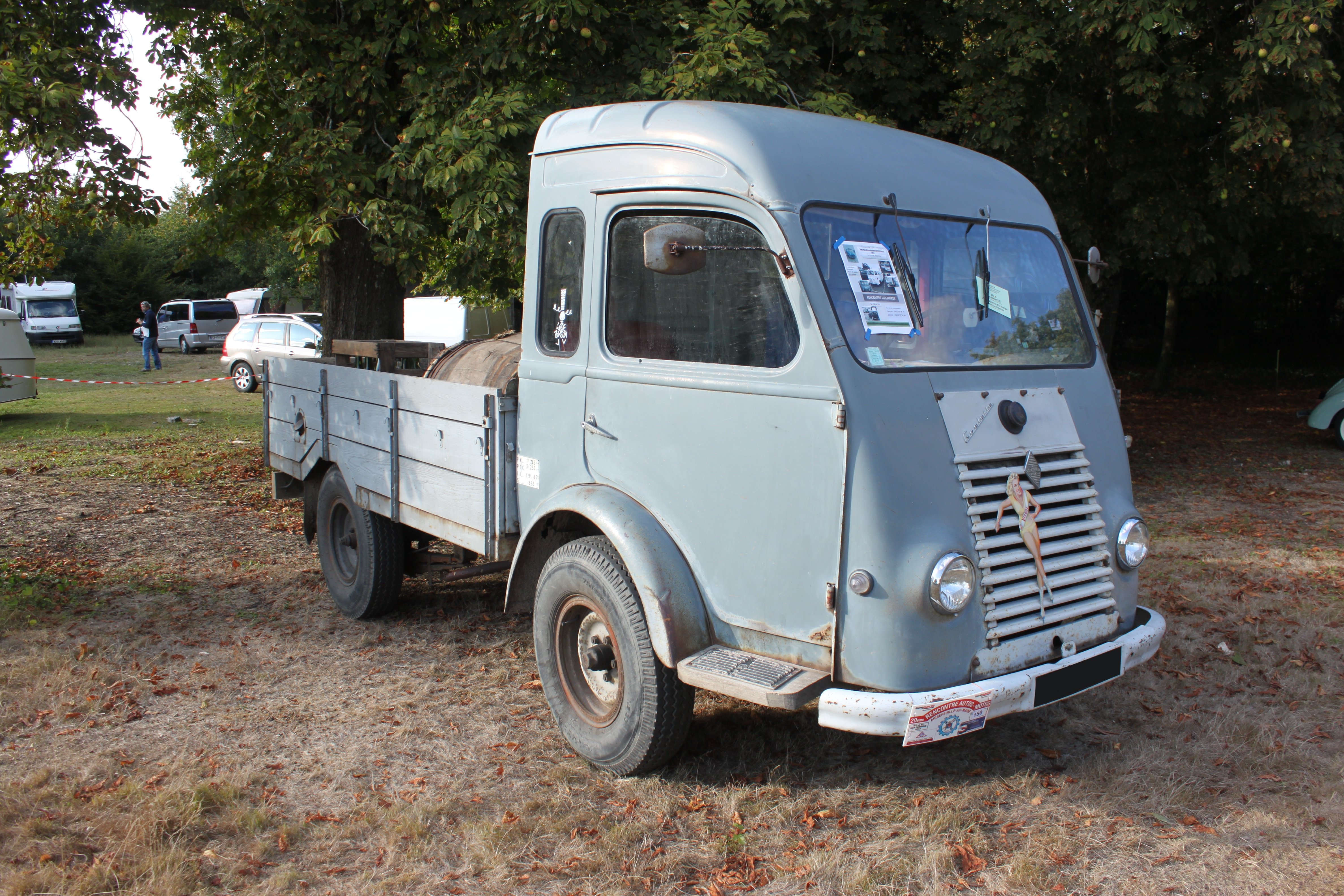 Renault Goélette pick-up.